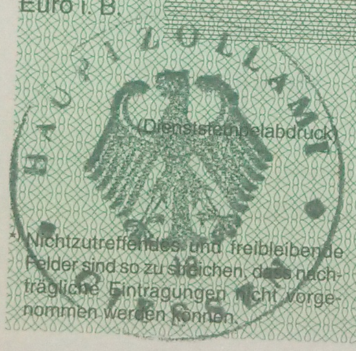 Siegelabdruck